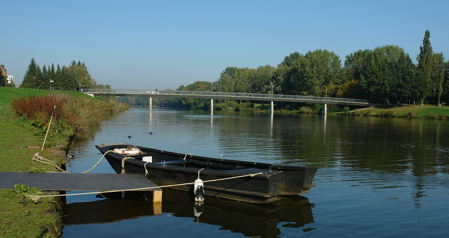 Kleine Weser in Bremen. Rad- und Fußgängerbrücke zwischen Habenhauser Deich (links) und Stadtwerder am Buntentorsdeichschart